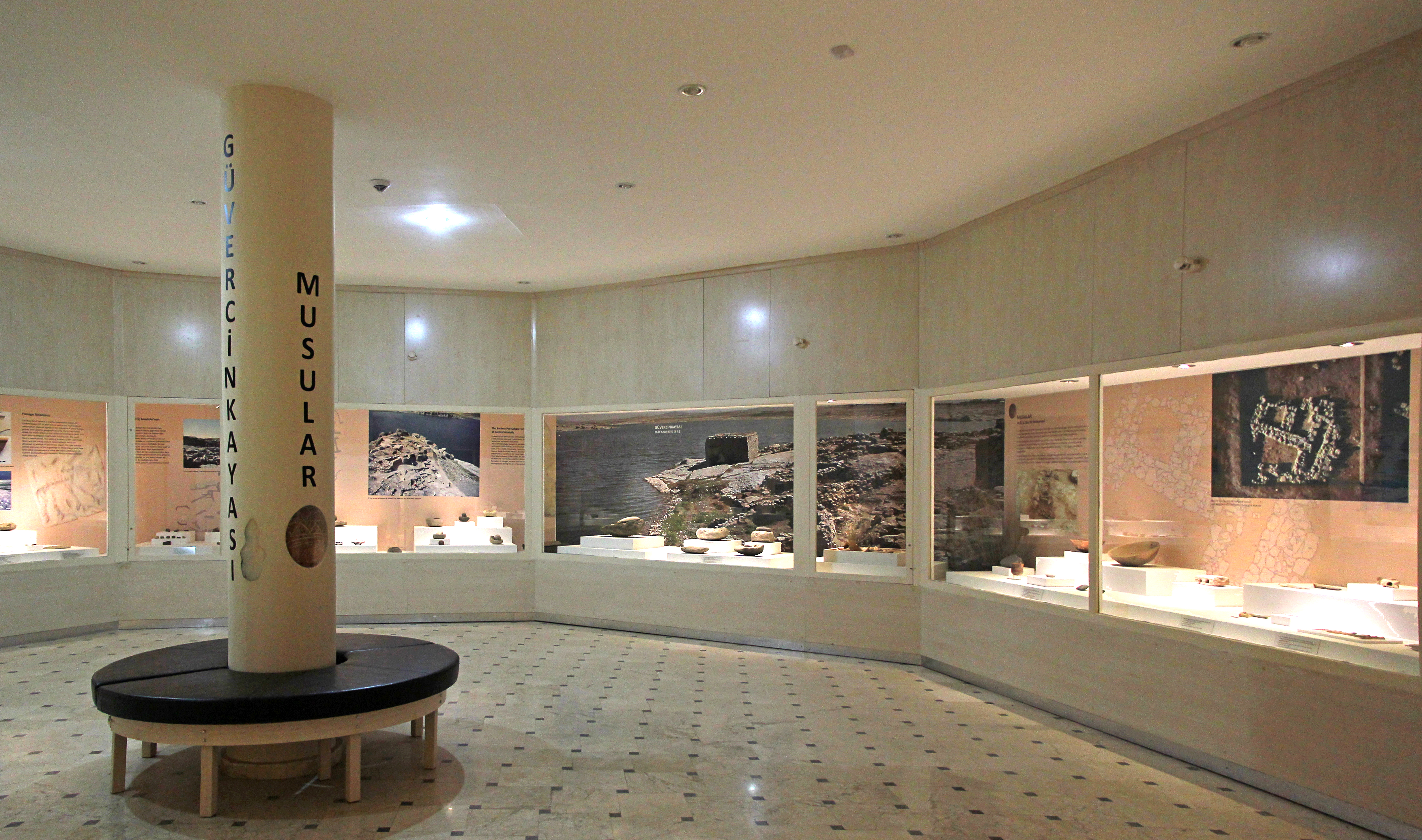 Aksaray Museum, Türkei, Galerie 2, Funde aus Musular und Güvercinkaya